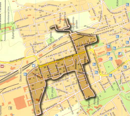 Bilde av «Skiens-hjorten», en kartozoologisk observasjon fra Skien.